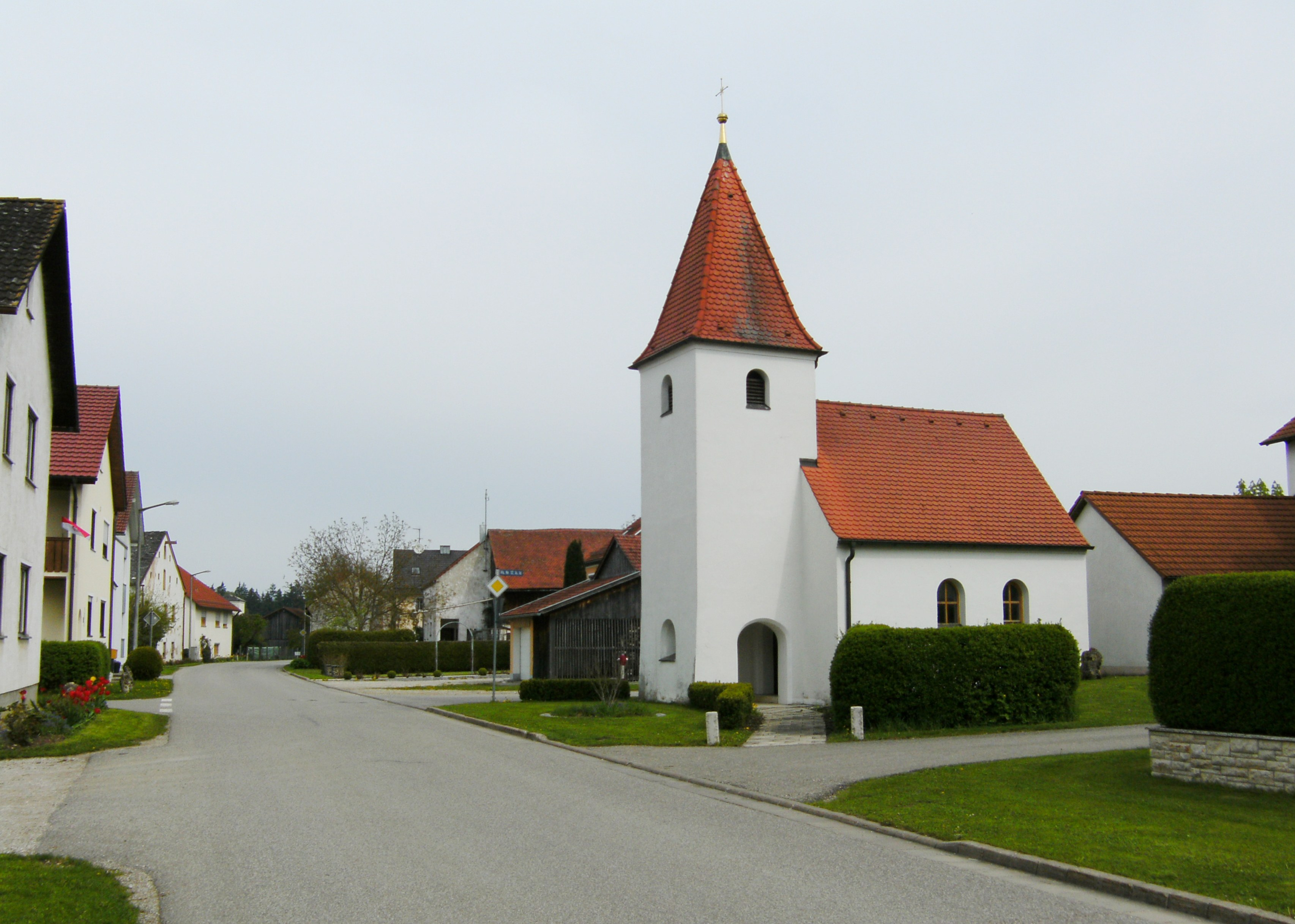 Katholische Kirche in Oberemmendorf, Gemeindeteil von Kipfenberg im Landkreis Eichstätt in Bayern